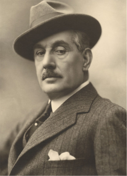 Una fotografia del compositore Giacomo Puccini